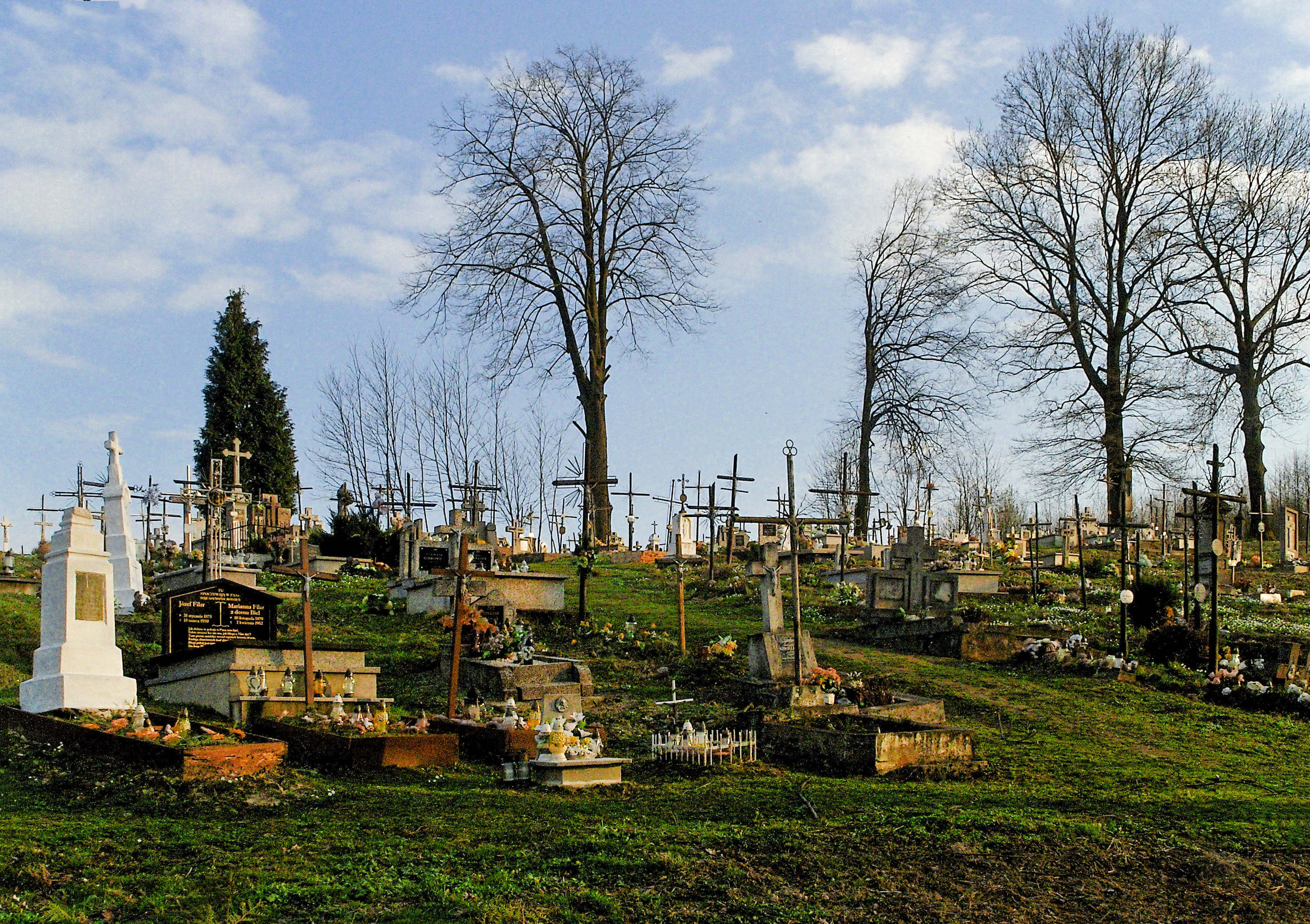 Stary Cmentarz w Bączalu Dolnym, założony pod koniec XVIII wieku, ostatecznie zamknięty w latach 50tych XX wieku